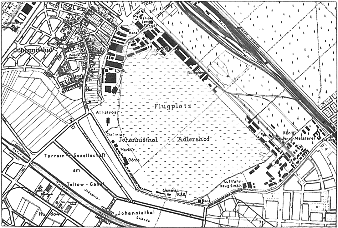 Abbildung des Flugfeldes Johannisthal/Adlershof im Jahr 1916. Der 1916 vollendete Gleisanschluss bis zu Albatros ist vorhanden, die bis 1917/1918 vollendete Ringbahn ist nicht vorhanden. Quelle zur Datumsbestimmung: Schmitt, Günter (1980) Als die Oldtimer flogen – Die Geschichte des Flugplatzes Johannisthal, Berlin: Transpress ISBN: 3-344-00129-9. , S. 173